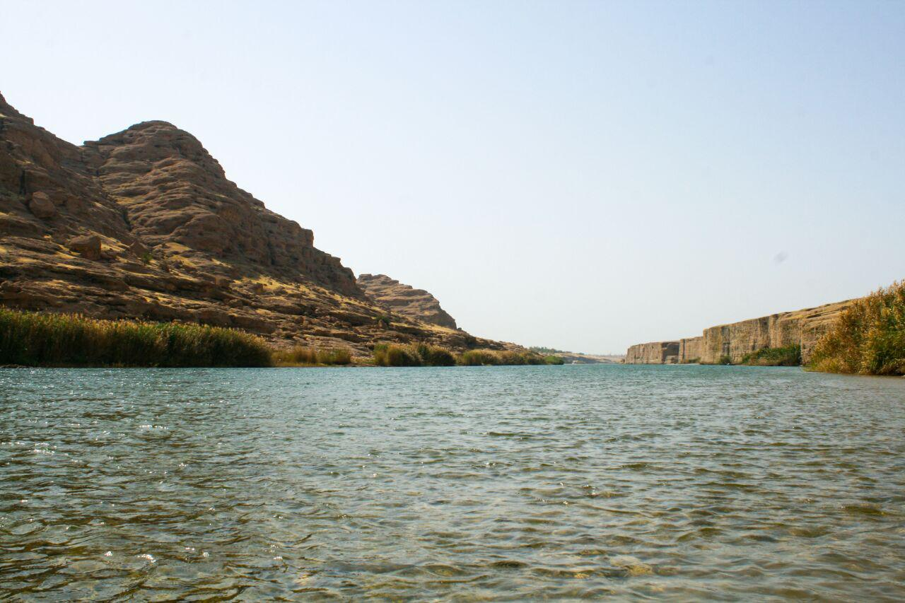 چال کندی دزفول